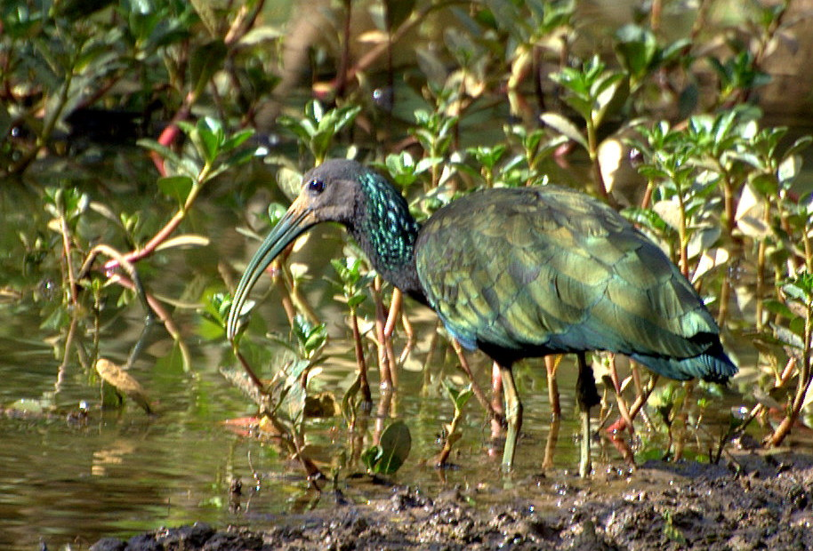 Horto Florestal de São Paulo